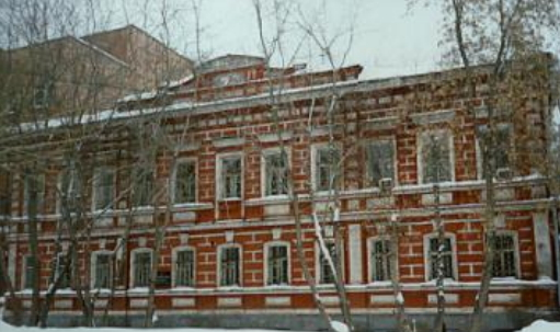 один из корпусов Естественнонаучного института Пермского университета